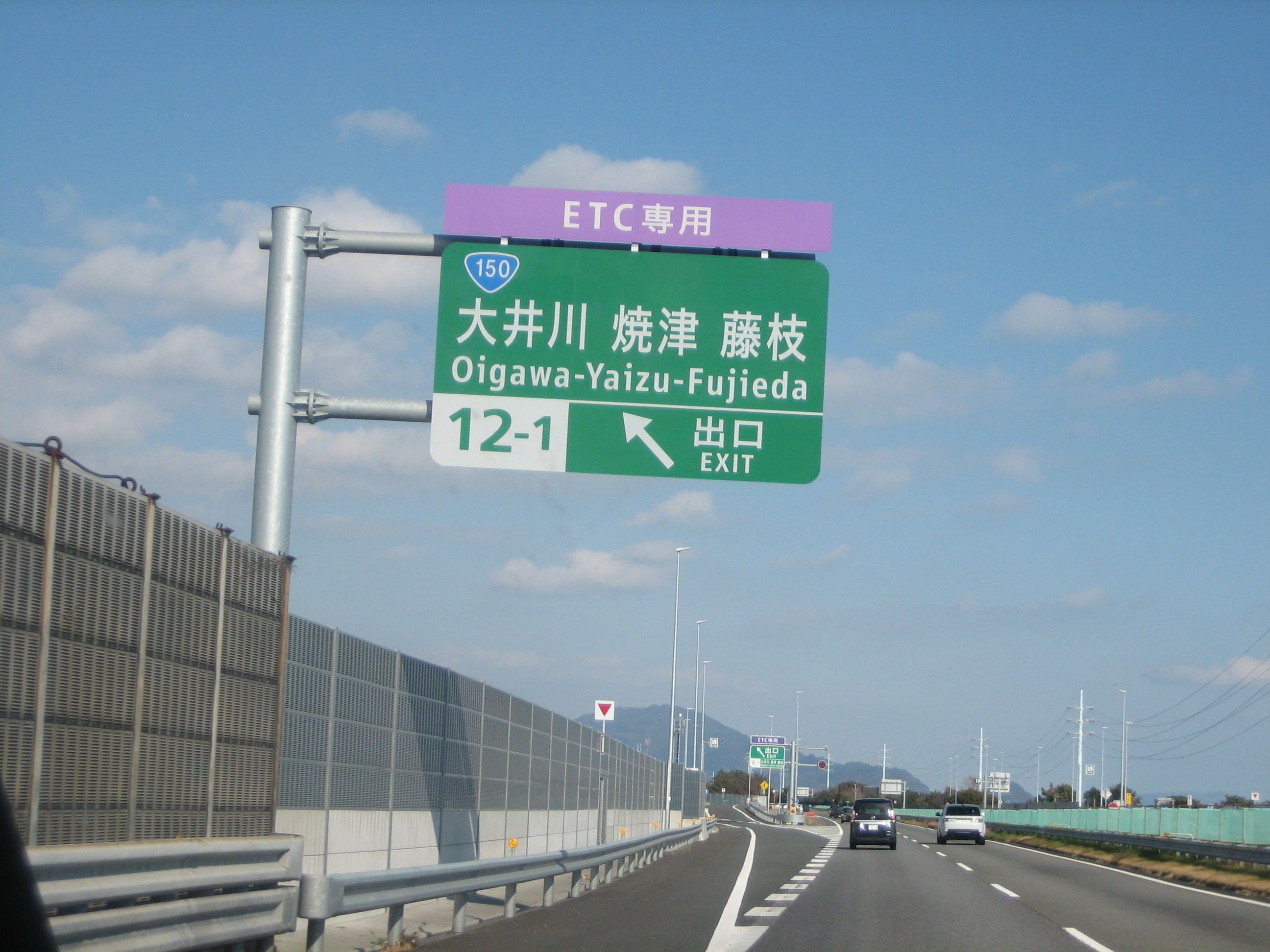 大井川焼津藤枝SIC